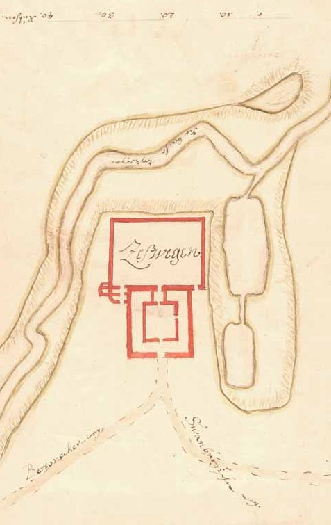 Linnuse plaan XVII sajandist. Rootsi Sõjaarhiiv.